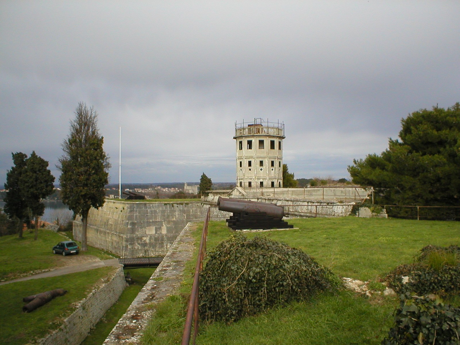 self-made